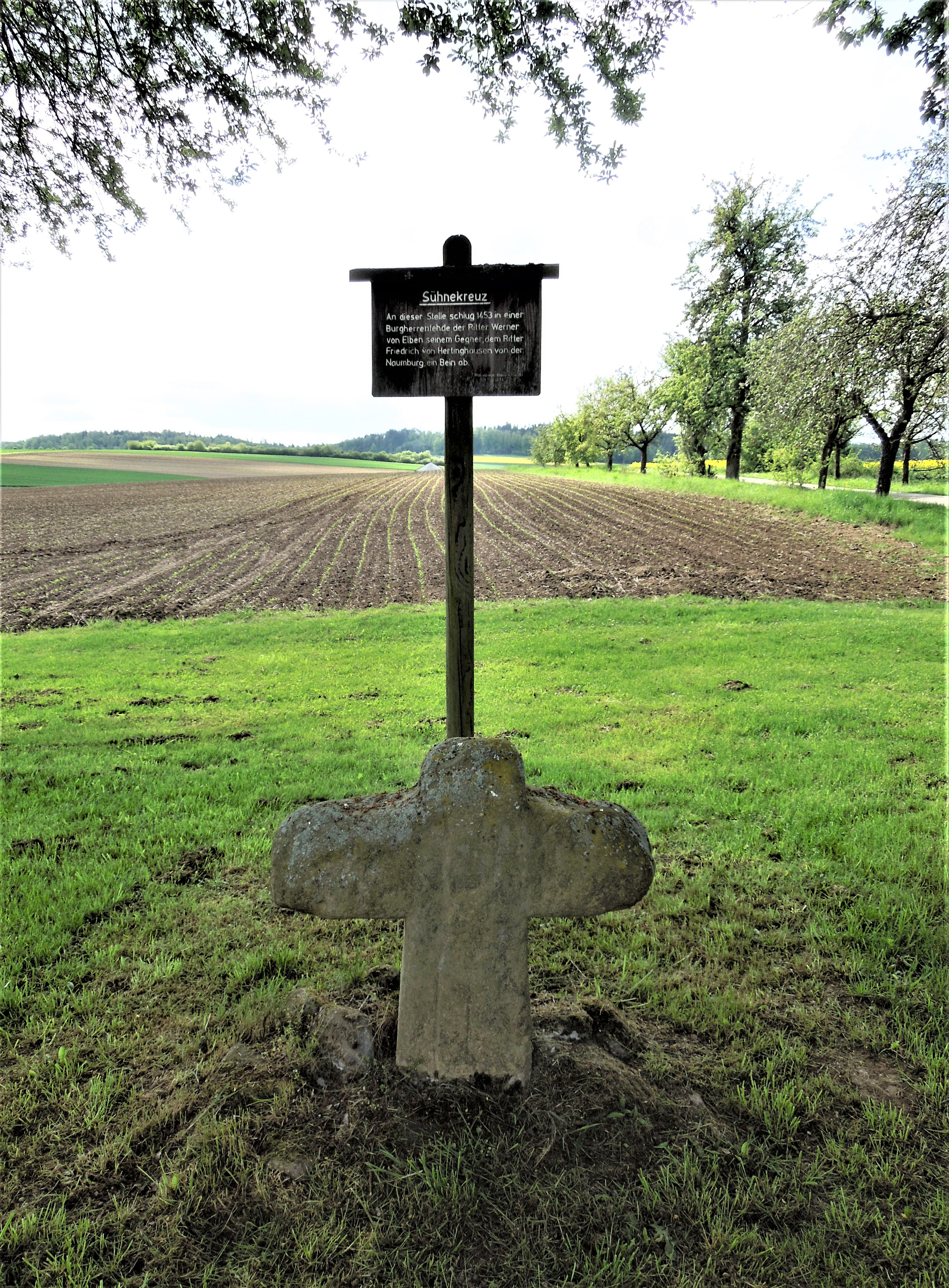 Das Sühnekreuz bei Elben (Naumburger Stadtteil Elbenberg), an der L 3214 und der Naumburger Straße